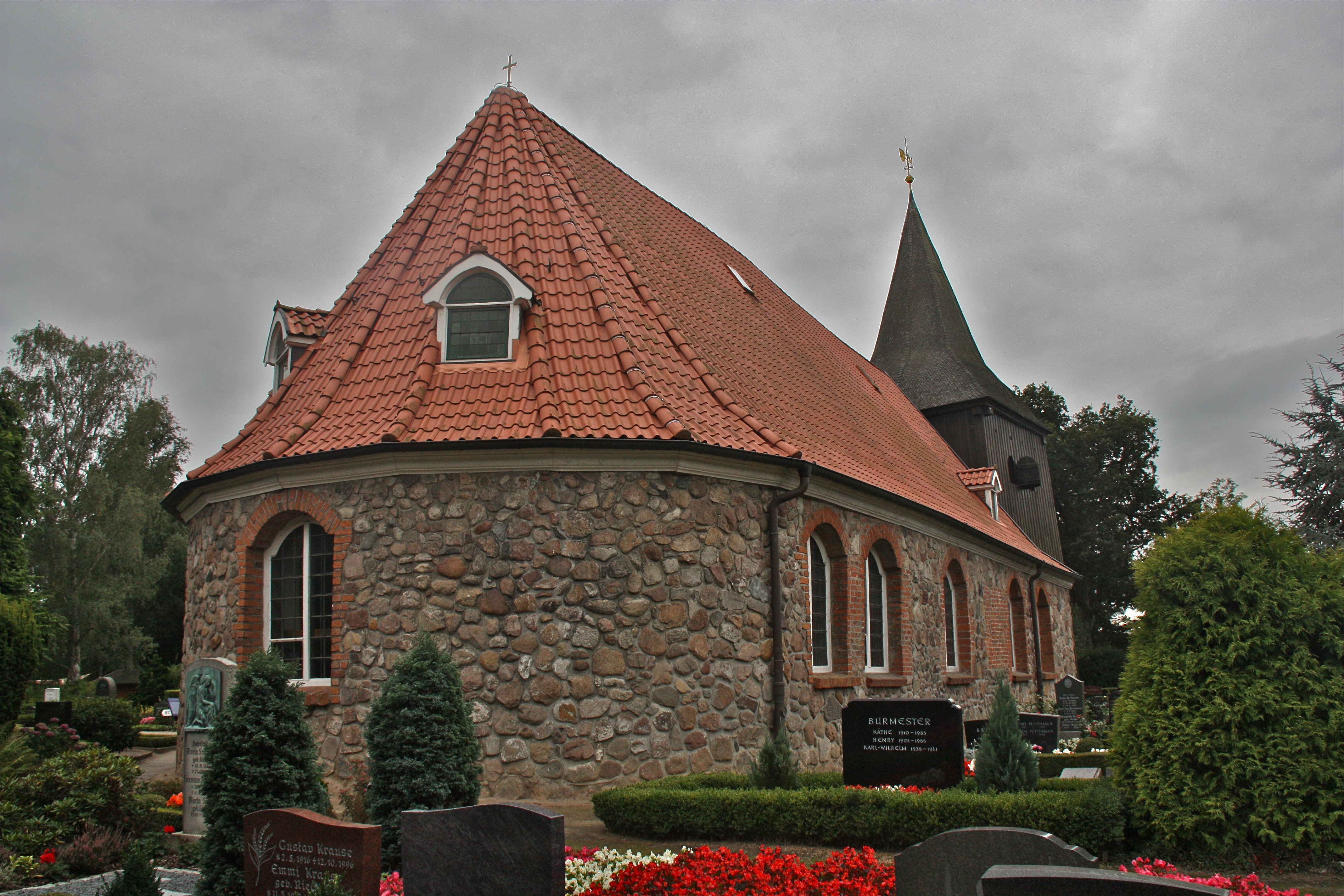 Sankt Nicolai, Hamburg-Altengamme, ChoransichtThis is a photograph of an architectural monument.